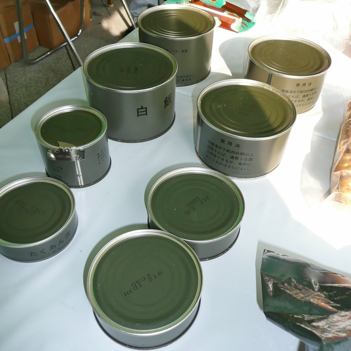 様々な戦闘糧食 I型。手前がオカズ缶、奥がカンメシ。